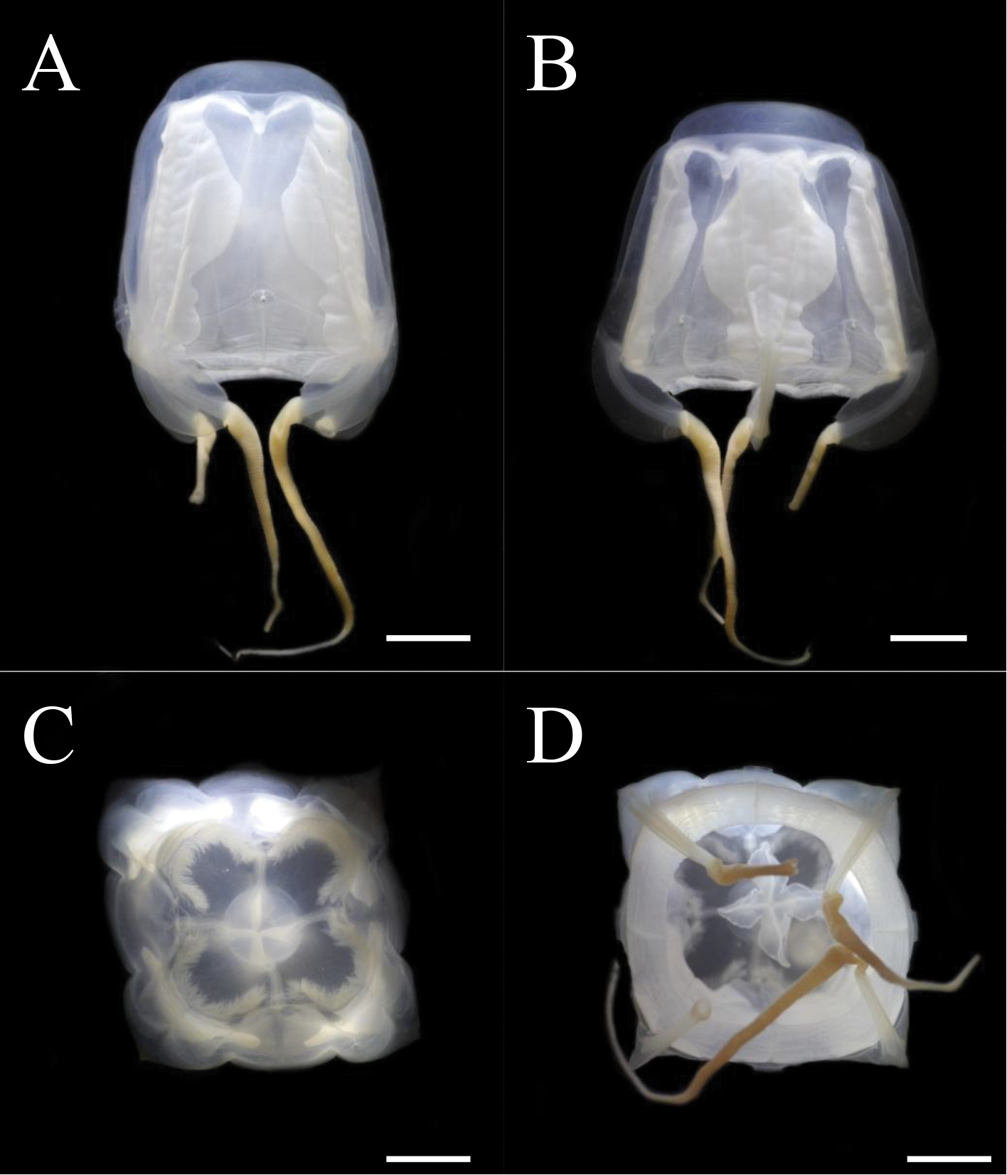 Meteorona kishinouyei. A y B: vistas laterales, C: vista apical, D: vista oral. Toshino S, Miyake H, Shibata H (2015) Meteorona kishinouyei, a new family, genus and species (Cnidaria, Cubozoa, Chirodropida) from Japanese Waters. ZooKeys 503: 1-21.